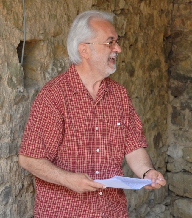 L'écrivain Christian Limousin au Festival Samedie Poésies Dimanche Aussi, Bazoches (2009). Photo Claude Labarre